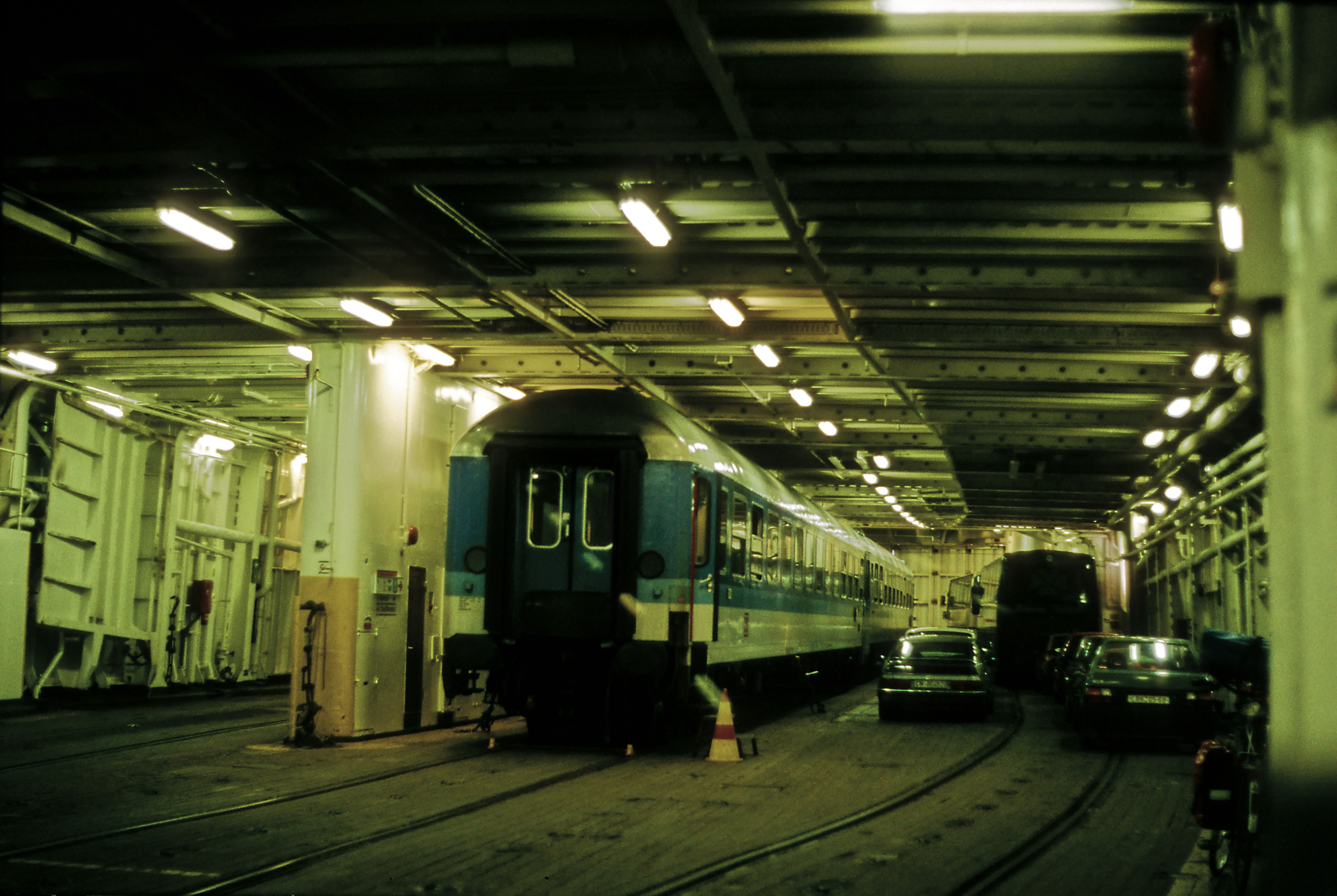 Seestrecke Warnemünde–Gedser, Hauptdeck mit den durchlaufenden Wagen Berlin–København. Im September 1994 war damit Schluss.